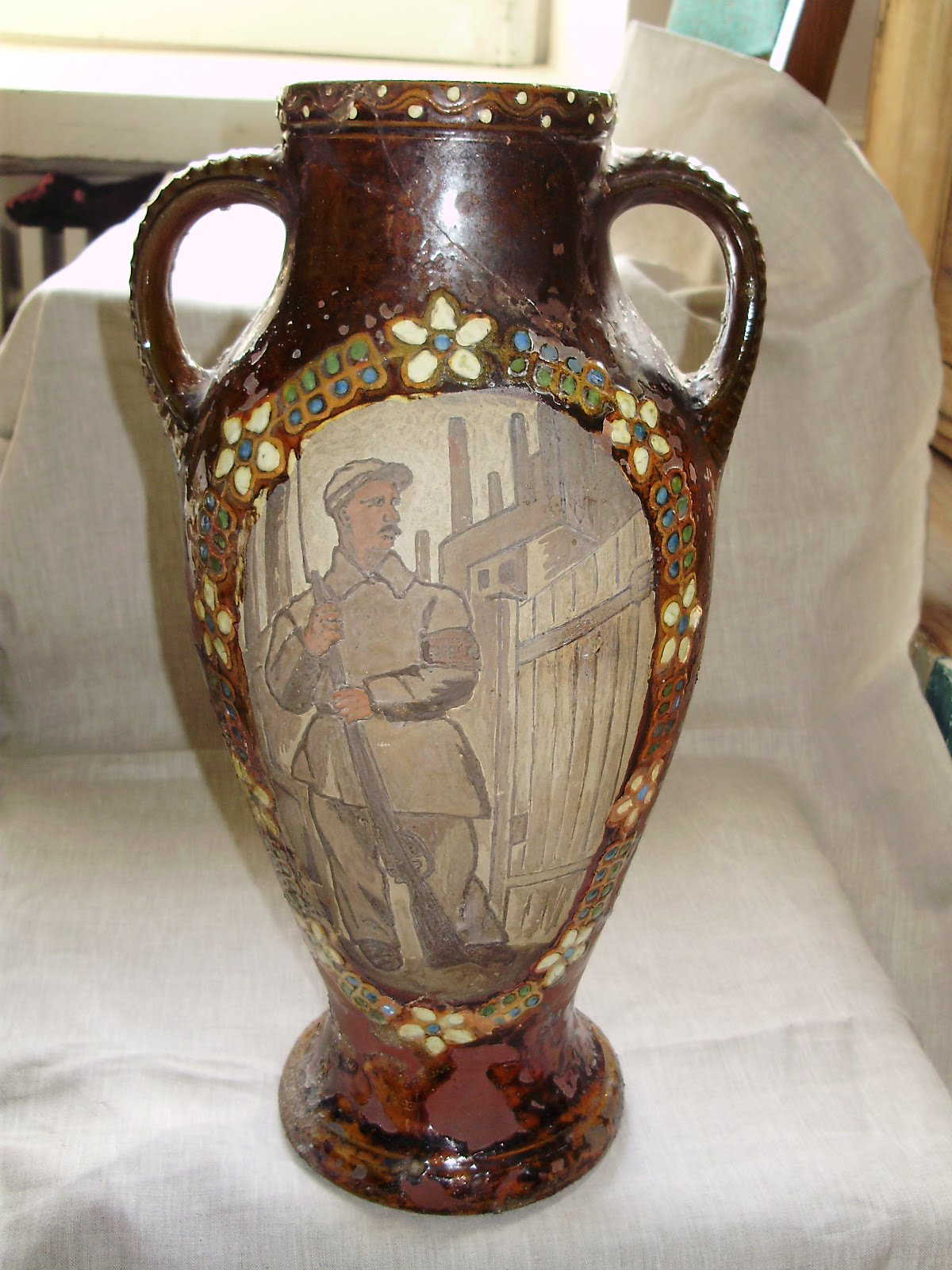 Опішнянський гончарний виріб - приклад станкового мистецтва.